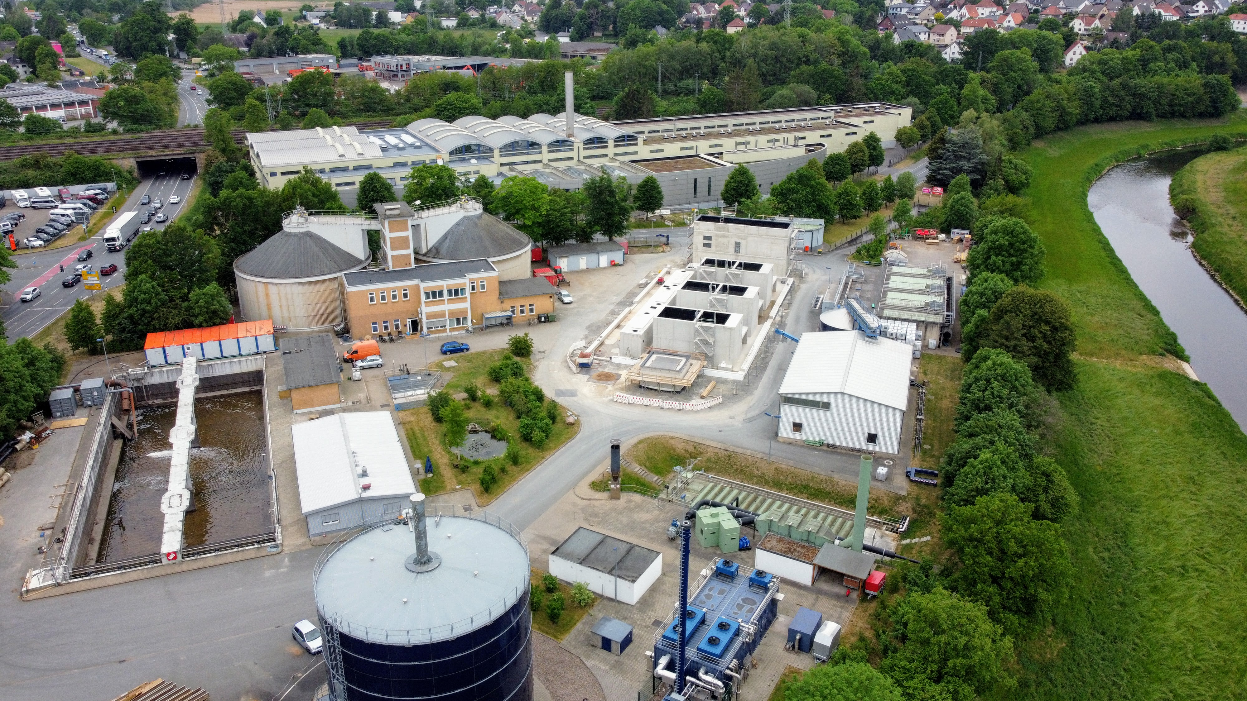 Kläranlage Herford Luftbild von Werreufer aus per Drohne